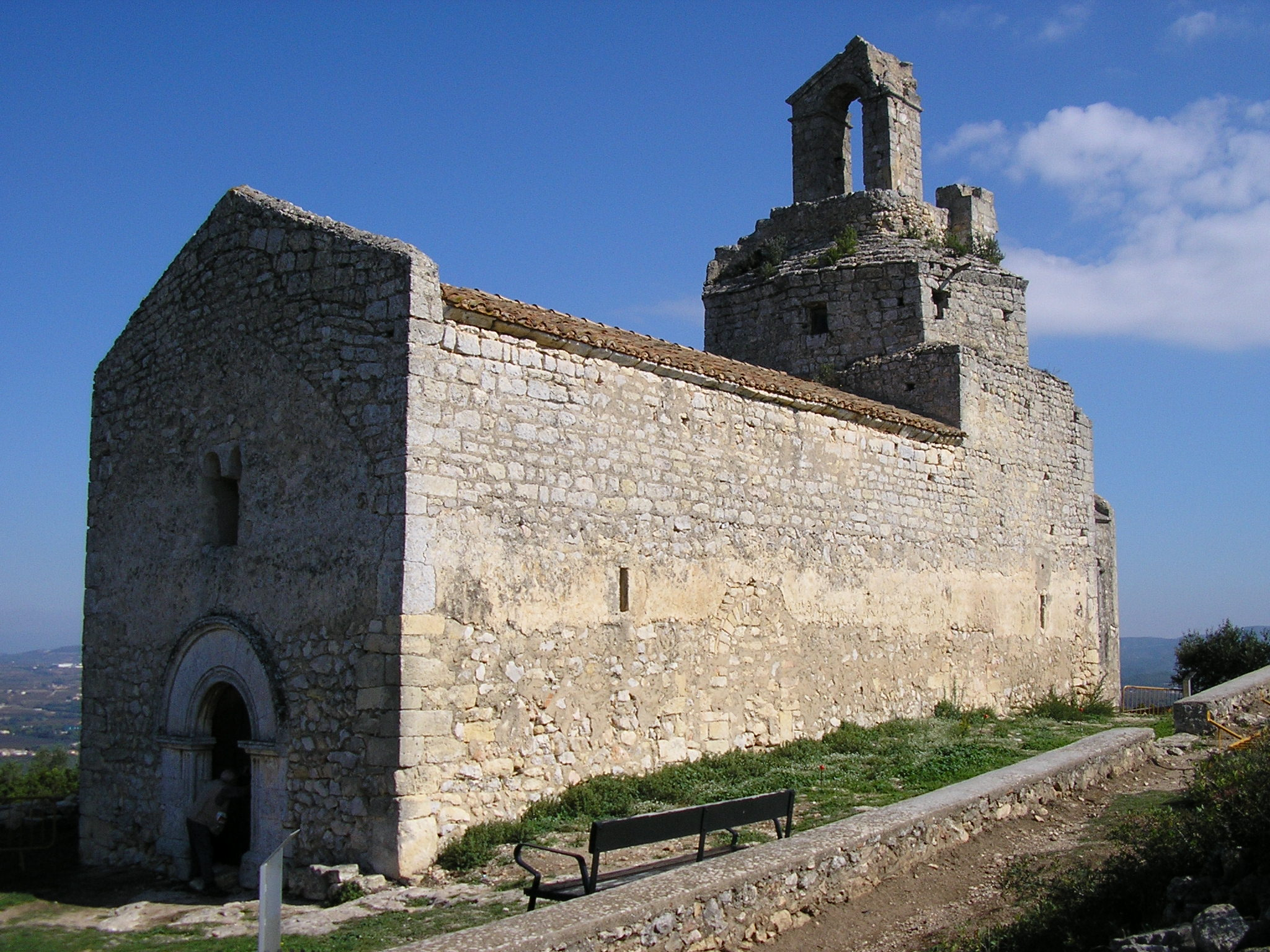 Olerdola - Iglesia de Sant Miquel (Vista Exterior 1)